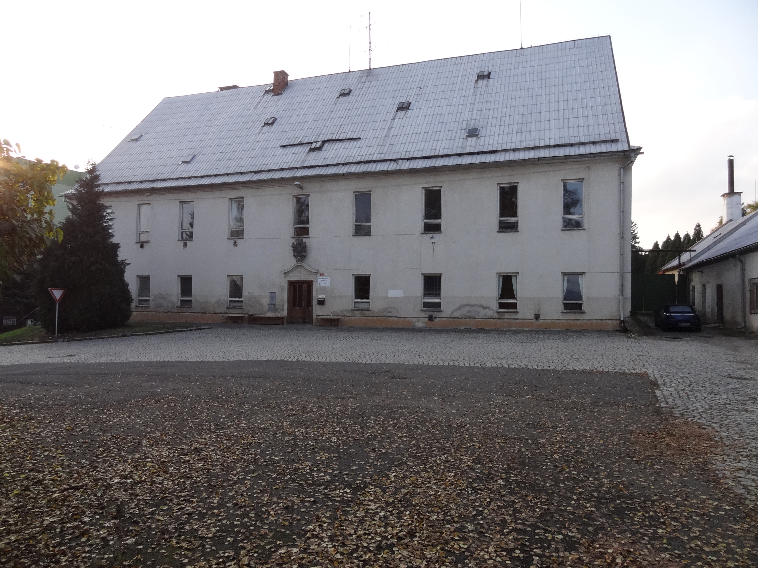 Dolní Temenice - bývalý lichtenštejnský hospodářský dvůr (ul. Zemědělská 3)